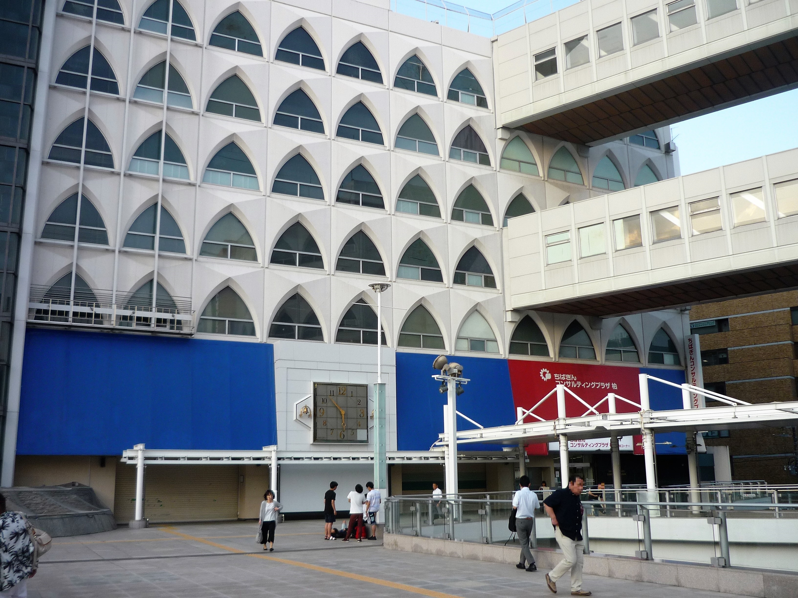 旧・そごう柏店（閉店後の2018年6月撮影）